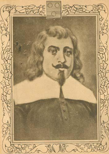 Portrait de Jean de Lauson (père)